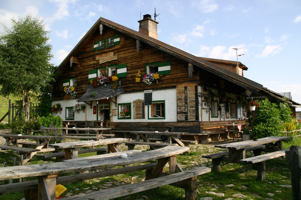 foto mitterfeldalm,gemaakt door auteur van artikel